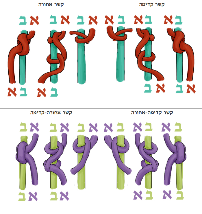 ישנם ארבעה קשרים חשובים הדרושים כדי להכין את מרבית צמידי החברות: קשר קדימה, קשר אחורה, קשר קדימה-אחורה וקשר אחורה-קדימה. קשר קדימה (איור ימני עליון) מורכב משני קשרים המבוצעים משמאל לימין עם החוט השמאלי כשהימני סטטי. בסוף הקשירה החוטים מחליפים את מקומותיהם. קשר אחורה (איור שמאלי עליון) הוא היפוך המראה של קשר קדימה - מבוצע עם החוט הימני לכיוון שמאל, וגם בו החוטים מחליפים את מקומותיהם. קשר קדימה-אחורה (איור ימני תחתון) מורכב משני קשרים כאשר הראשון מביניהם מבוצע משמאל לימין והשני מבוצע מימין לשמאל. התוצאה שלו נראית זהה לתוצאתם של שני הקשרים הראשונים, אולם בסיום קשירתו החוטים נותרים בסדר שהיו ואינם מחליפים ביניהם. קשר אחורה-קדימה (איור שמאלי תחתון) הוא היפוך המראה של קשר קדימה-אחורה, וגם בו החוטים נותרים במקומם.